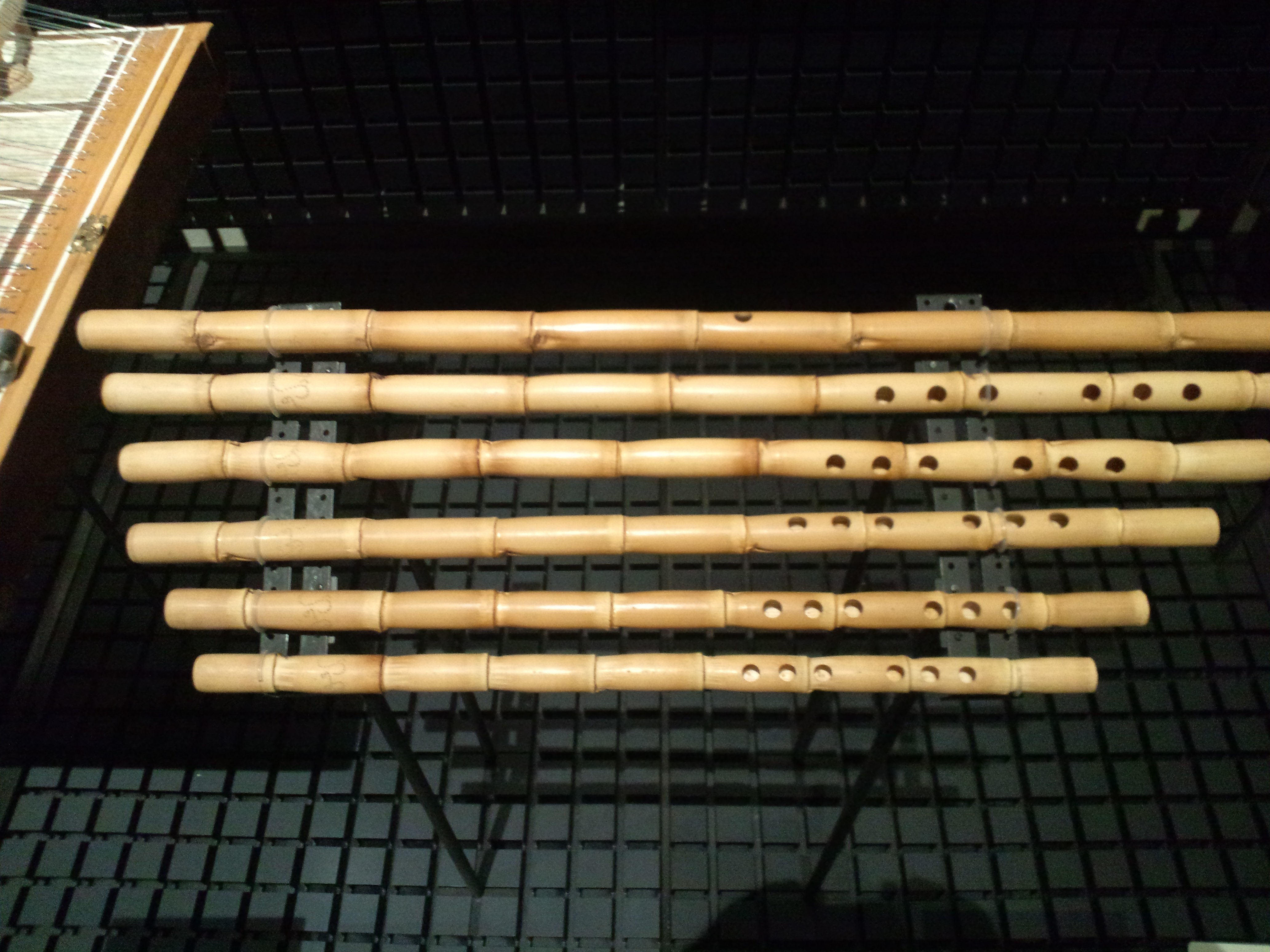 国立民族学博物館（大阪） ナーイ（エジプト、カイロ、2000年制作）